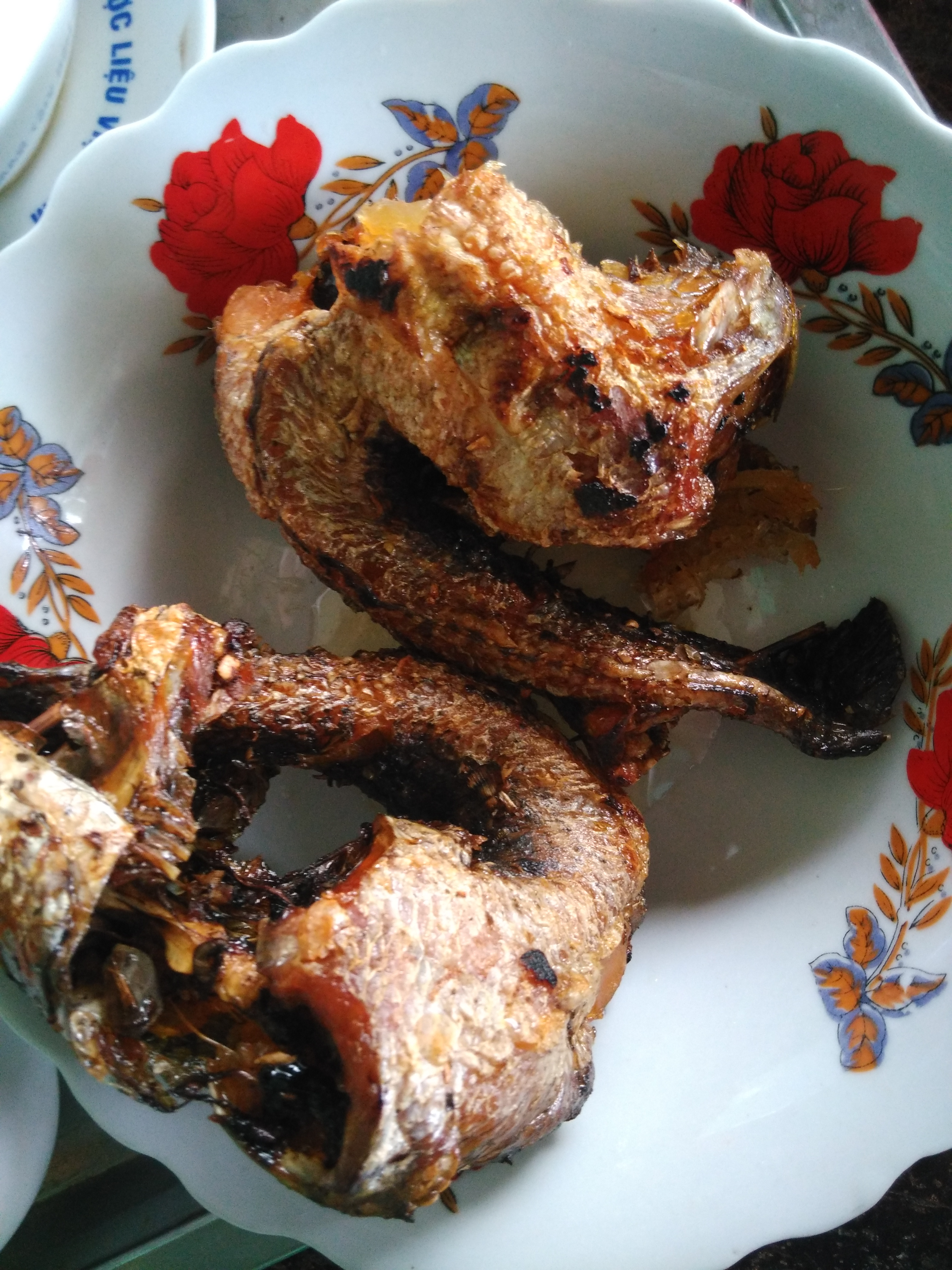 Món cá tràu Gio Linh (cá lóc đồng), chiên khô, đặc sản của vùng Gio Linh, Quảng Trị